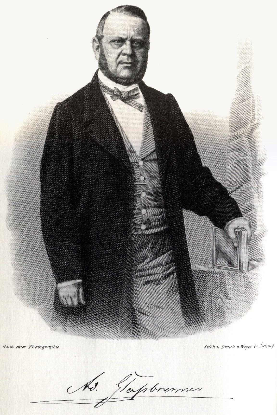 Stich von Adolf Glaßbrenner nach einer Fotografie